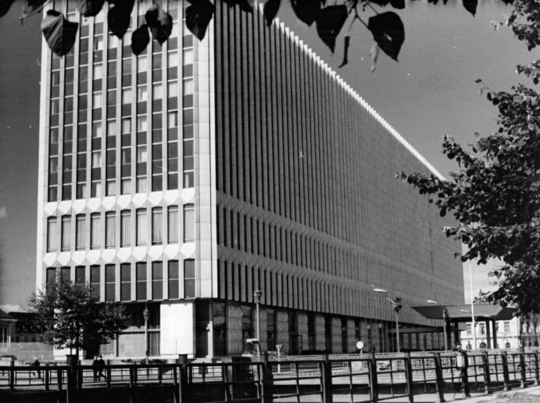 Berlin, Aussenministerium ADN-ZB Junge 27.9.72-1a-Berlin: Ministerium für Auswärtige Angelegenheiten